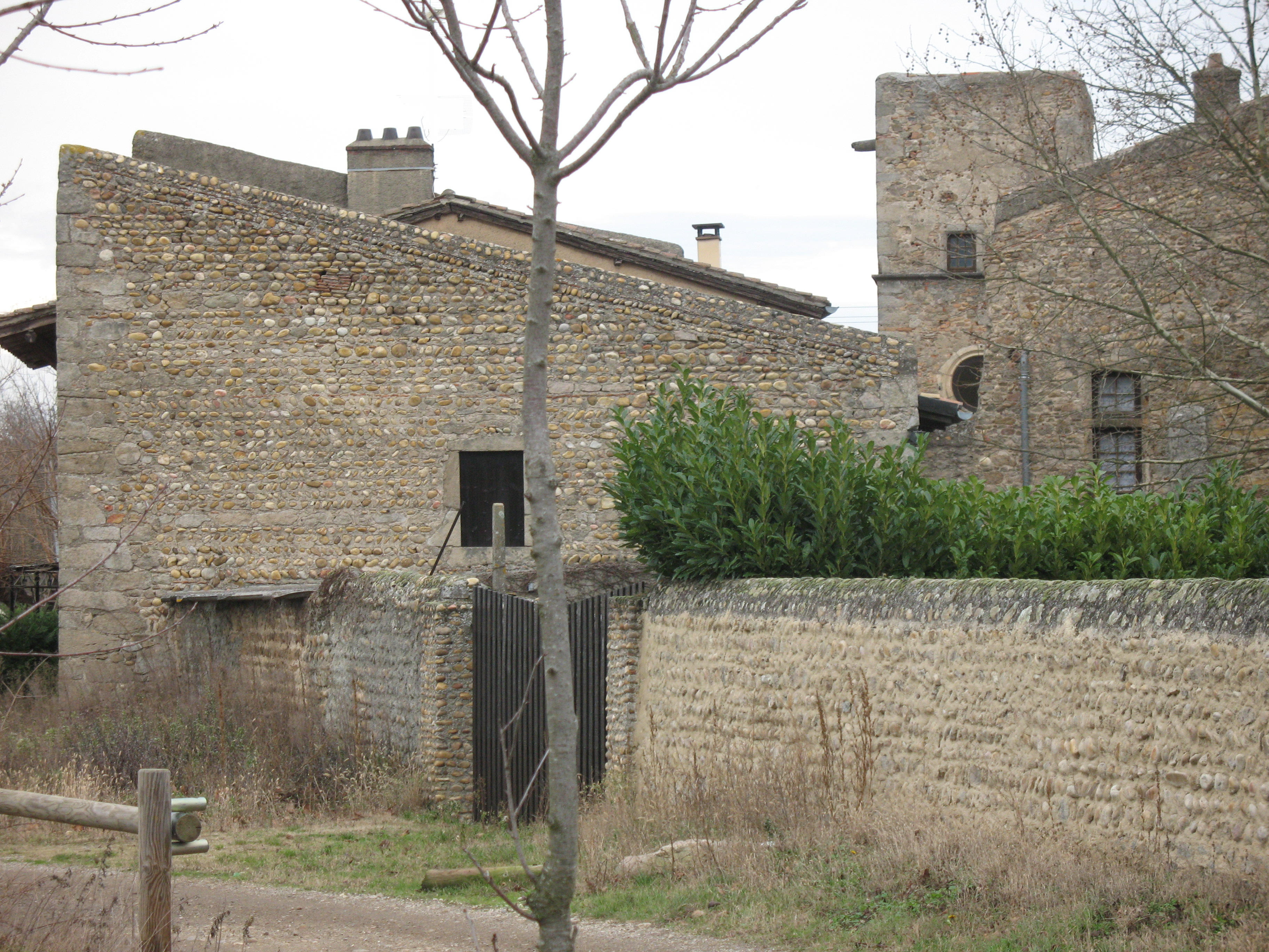 Maison forte d'Épeisses à Vourles dans le Rhône